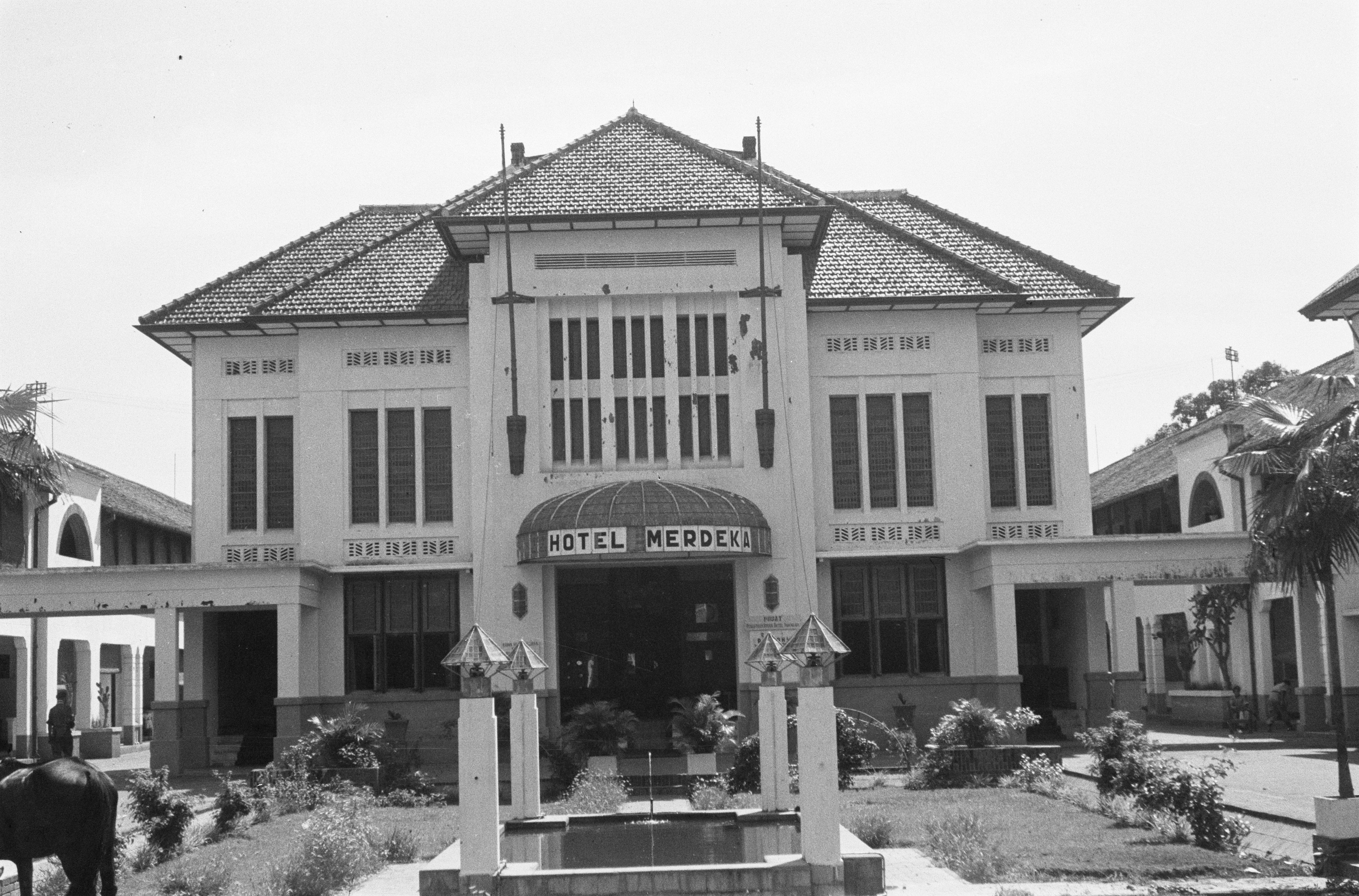 Collectie / Archief : Fotocollectie Dienst voor Legercontacten Indonesië Reportage / Serie : [DLC] De T-brigade in Djokja Beschrijving : Hotel Merdeka aan de Jalan Maliboro Annotatie : Nu hotel Inna Garuda Datum : 19 december 1948 Locatie : Indonesië, Nederlands-Indië, Yogyakarta Fotograaf : Zijlstra, J. / DLC Auteursrechthebbende : Nationaal Archief Materiaalsoort : Negatief (zwart/wit) Nummer archiefinventaris : bekijk toegang 2.24.04.02 Bestanddeelnummer : 5415